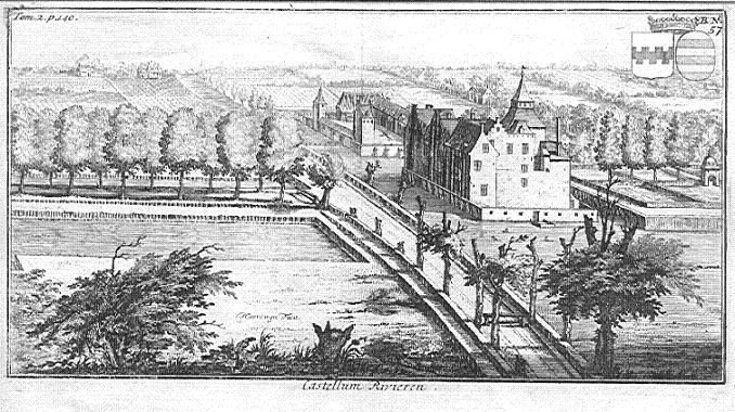 Le domaine de Rivieren en 1638 appartenant au couple Kinschot-Oyenbrugghe dont les armes sont représentées dans le coin supérieur droit.